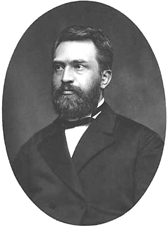 Anthony Ewoud Jan Modderman, minister van Justitie